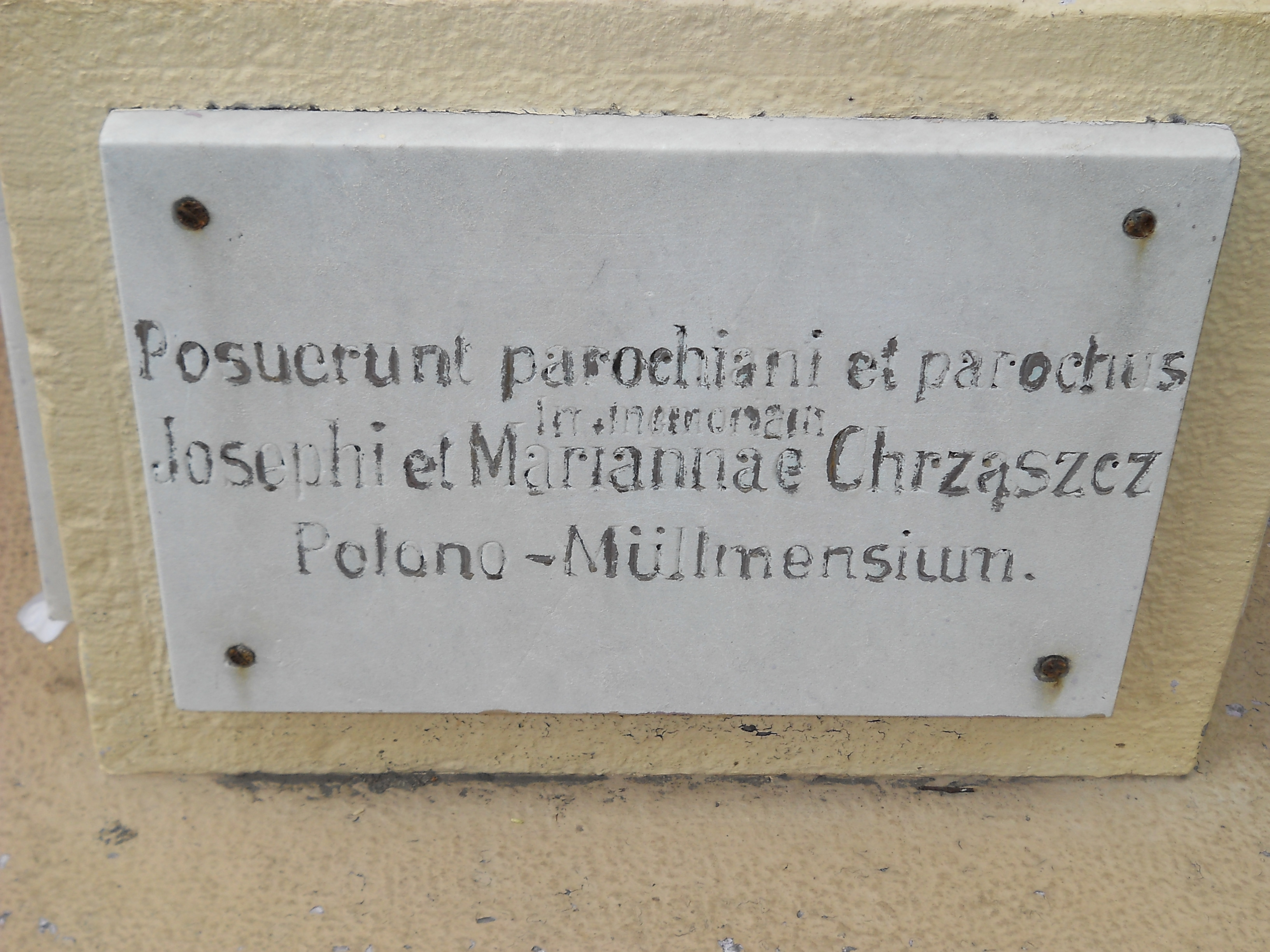 Pyskowice, ul. Poniatowskiego 10 - kościół parafialny pw. św. Mikołaja, kolumna maryjna, tablica (zabytek nr A/289/60 z 7.03.1960)